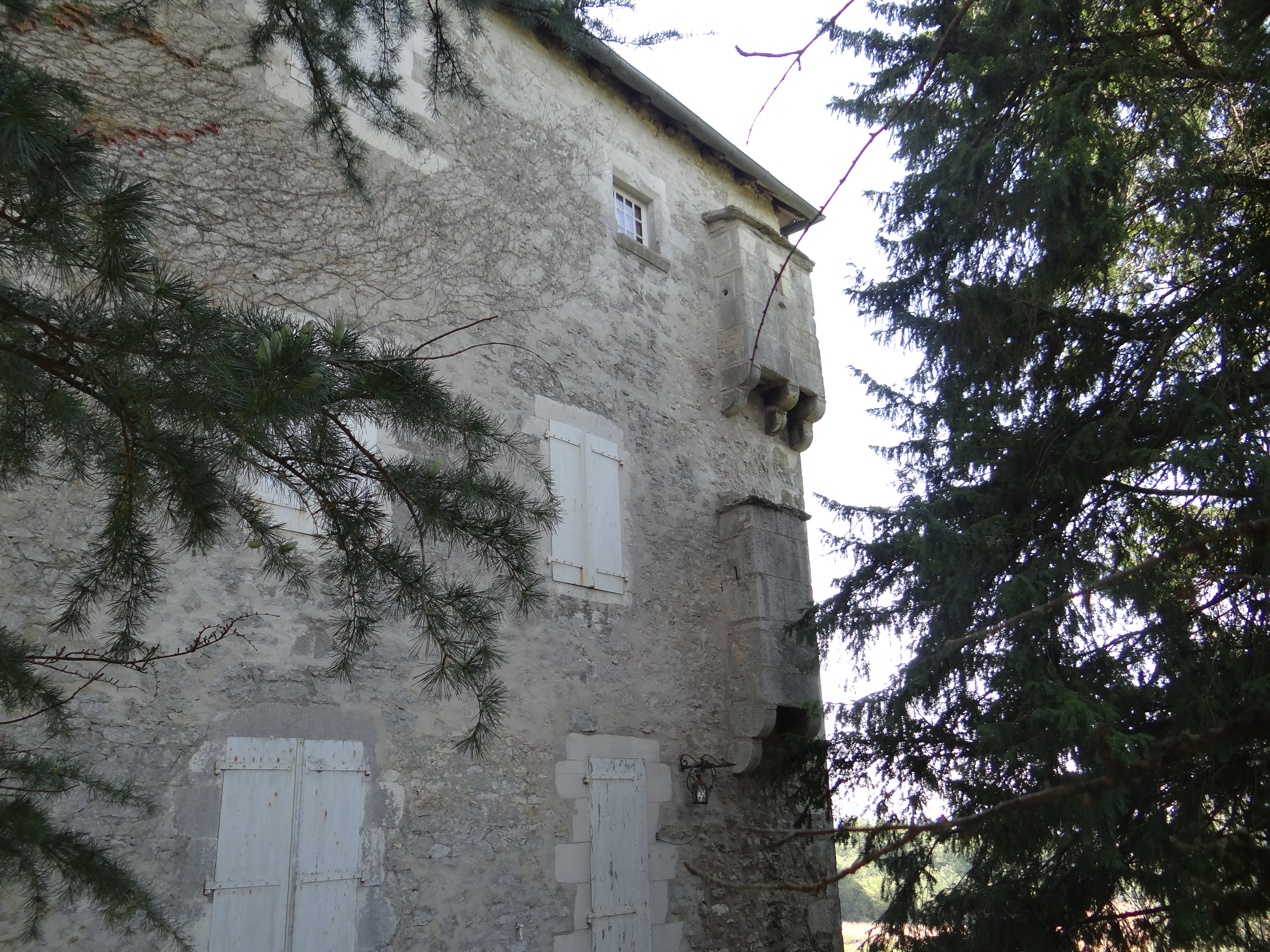 Vue de la façade nord du Château de Mayrac (Lot, France) , fin XVe siècle